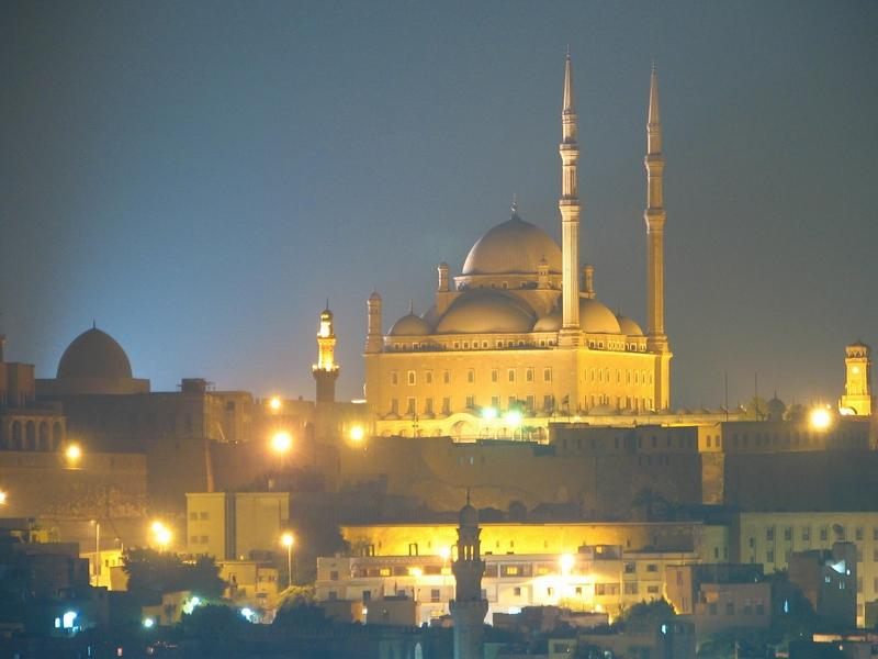 قلعة صلاح الدين الأيوبي بالقاهرة (ليلاً)